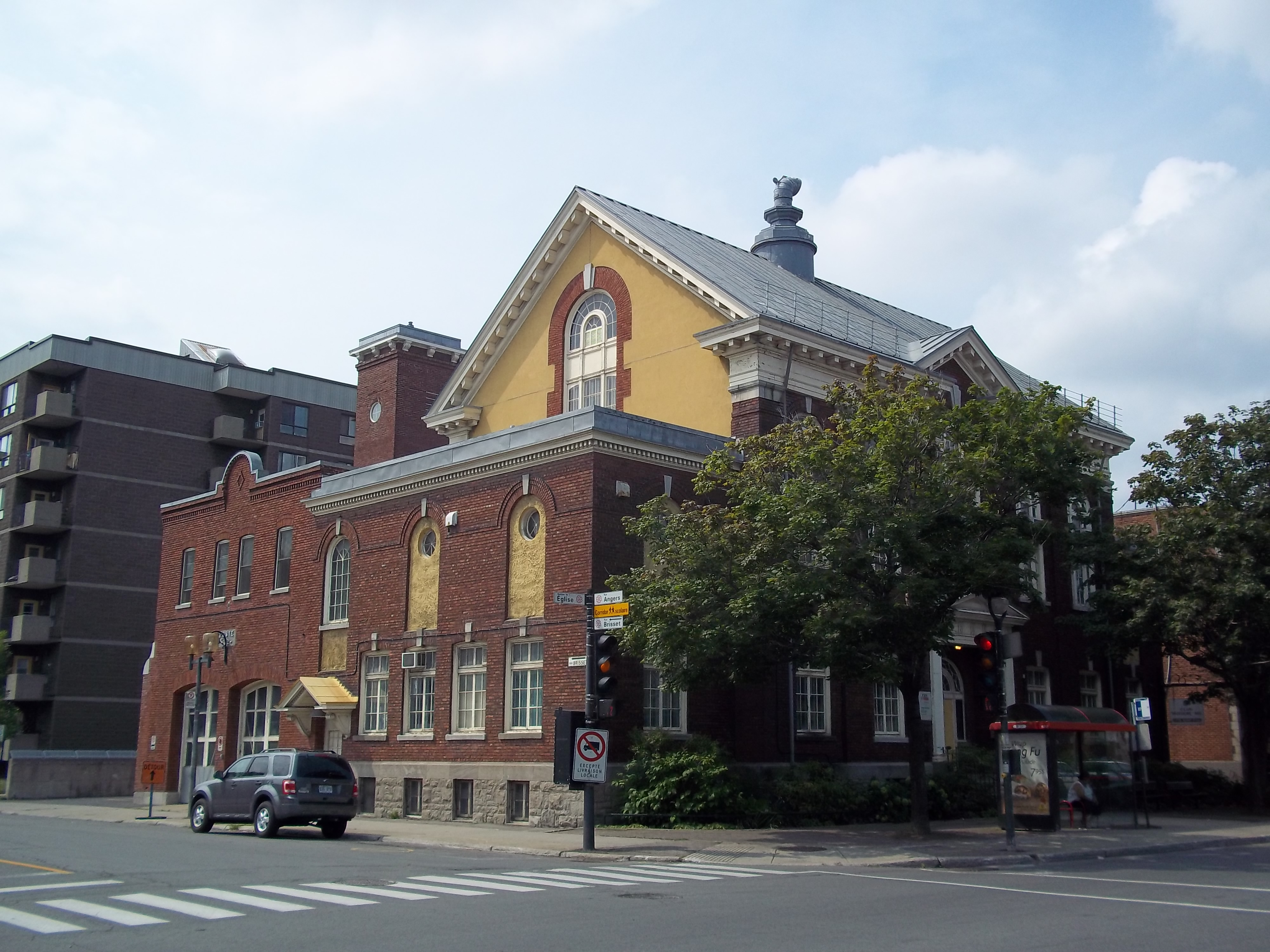 Ancien hôtel de ville de Côte-Saint-Paul, 1604, avenue de l'Église, Montréal (info)